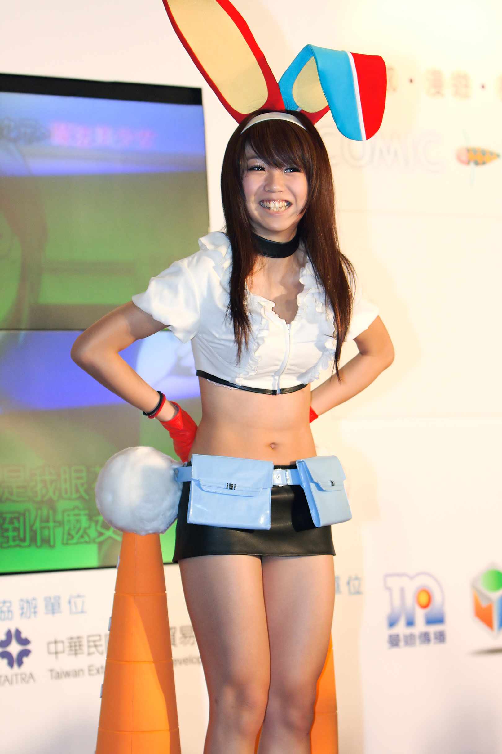 2009年第十七屆臺北國際書展，郭書瑤出席臺北世貿二館「瑤瑤米娜Cosplay元宵樂」，cosplay《月面兔兵器米娜》月城米娜。